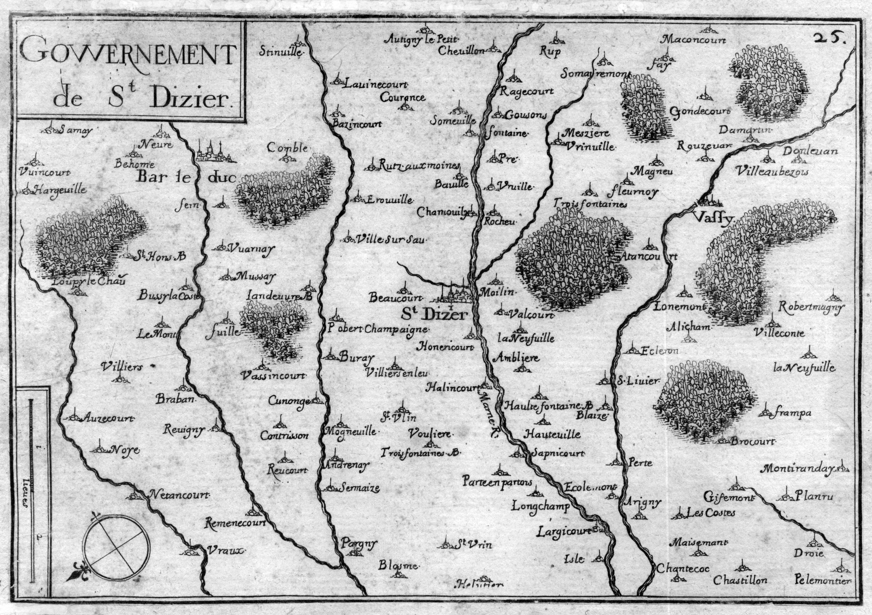 St-Dizier in Davanne-Chappier.